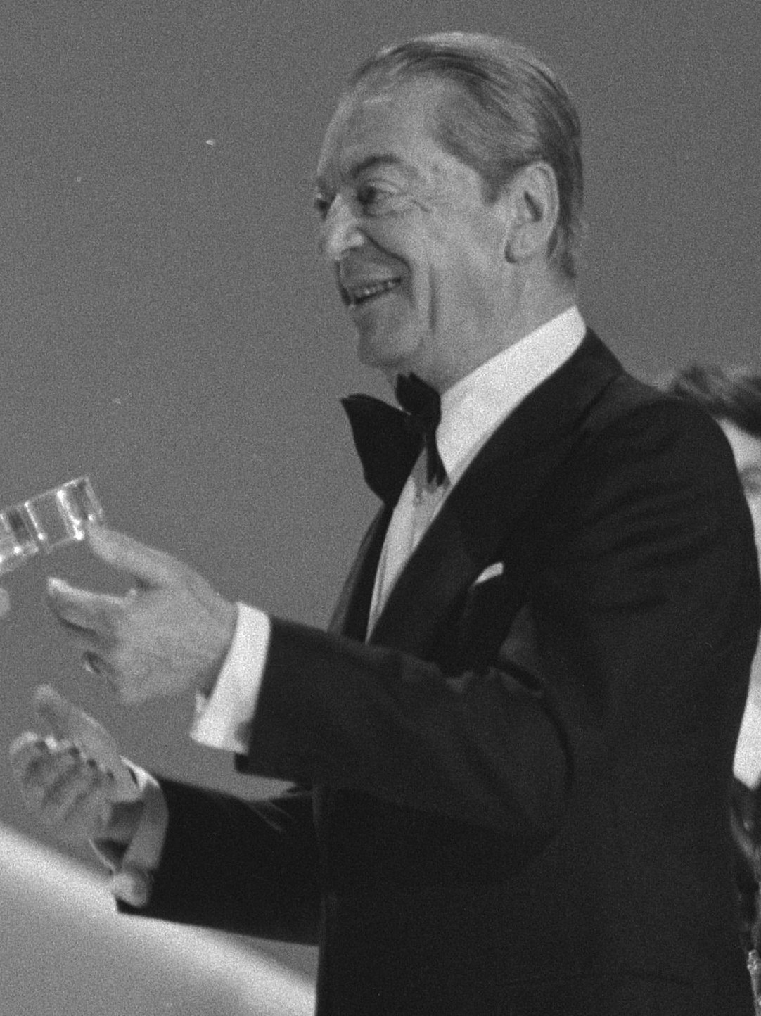 Collectie / Archief : Fotocollectie Anefo Reportage / Serie : [ onbekend ] Beschrijving : Eurovisie Songfestival 1980 ( Den Haag ); Marcel Bezençon Datum : 19 april 1980 Locatie : Den Haag, Zuid-Holland Trefwoorden : Winnaars, prijzen, songfestivals Persoonsnaam : Marcel Bezençon Fotograaf : Dijk, Hans van / Anefo Auteursrechthebbende : Nationaal Archief Materiaalsoort : Negatief (zwart/wit) Nummer archiefinventaris : bekijk toegang 2.24.01.05 Bestanddeelnummer : 930-7807